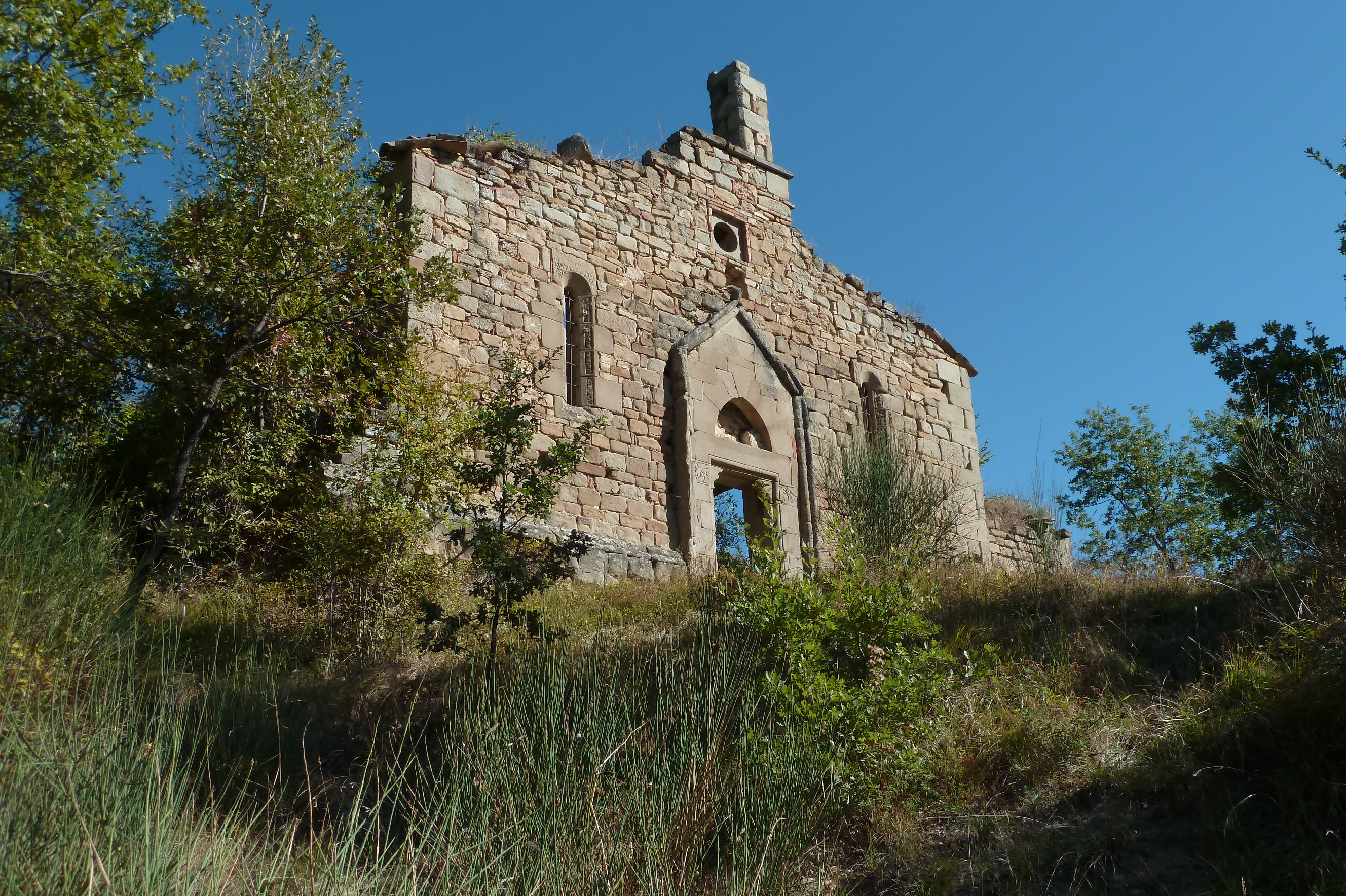 Chiesa di San Flaviano (Tavolero)